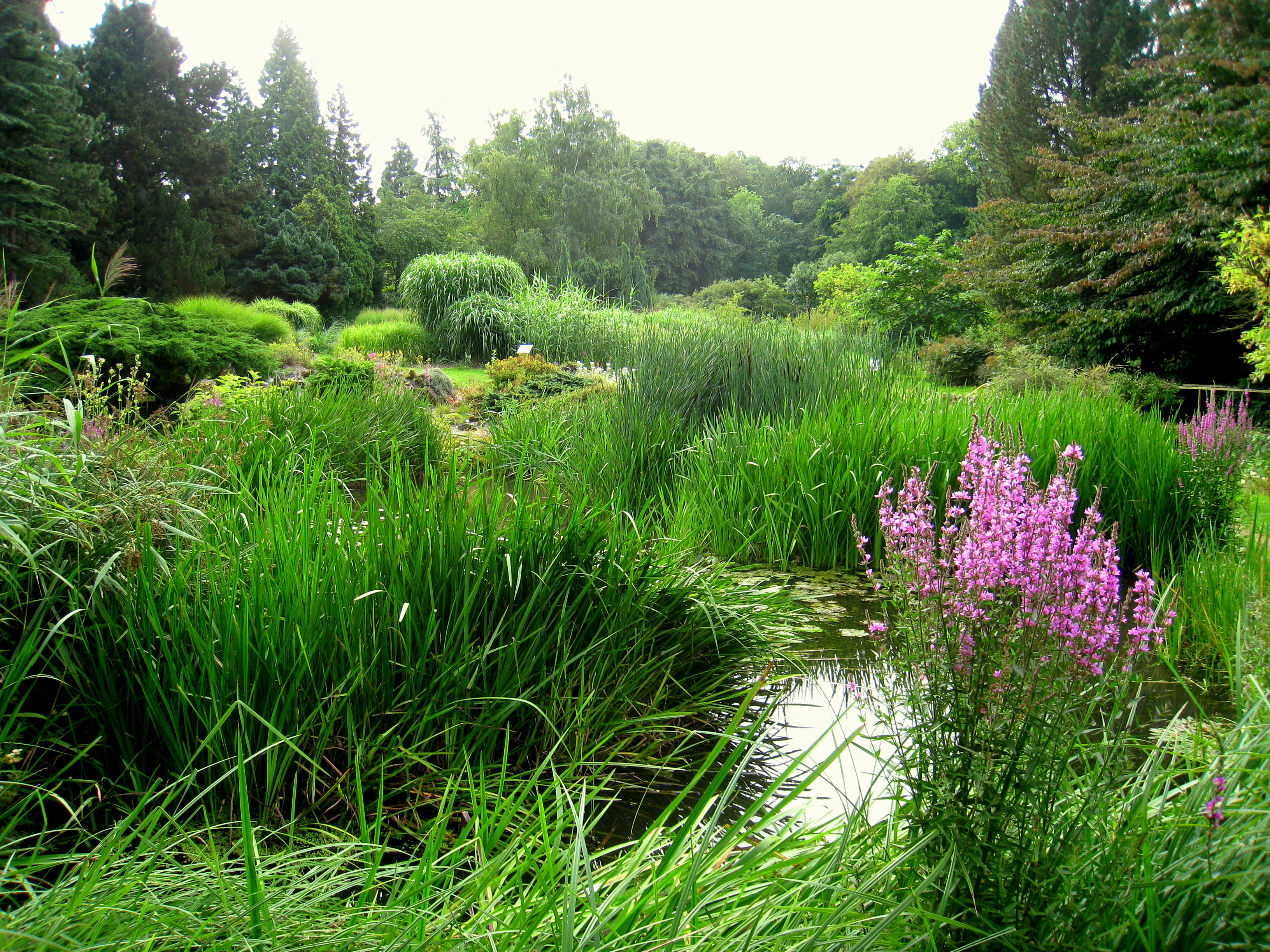 Botanischer Garten der TU Darmstadt, Darmstadt, Germany.